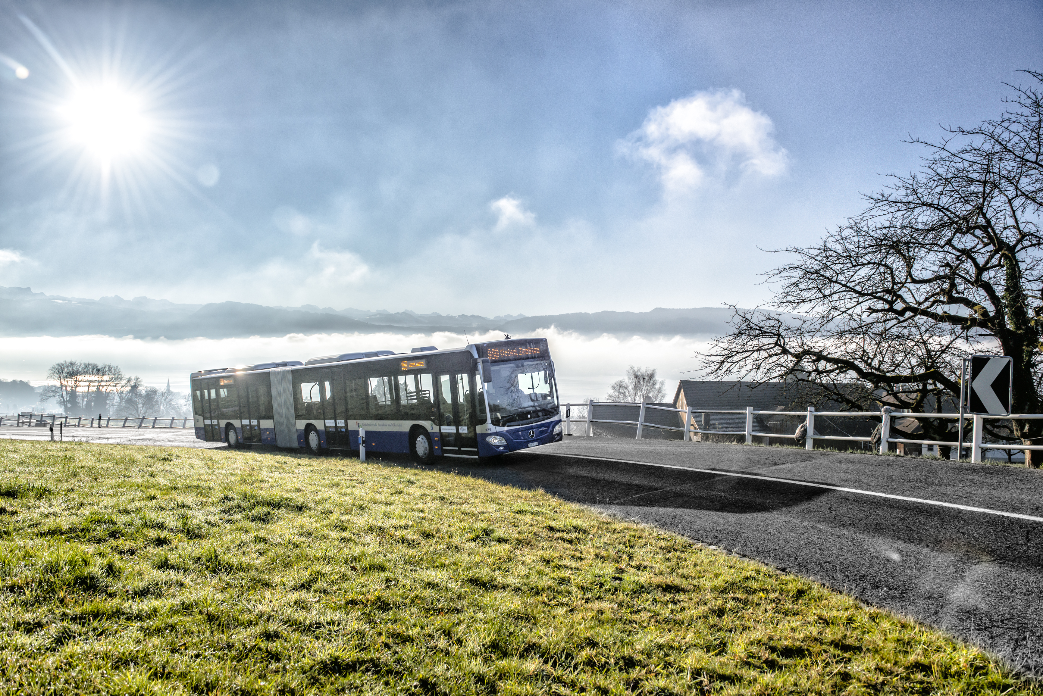 VZO-Gelenkbus im aktuellen Design oberhalb von Stäfa